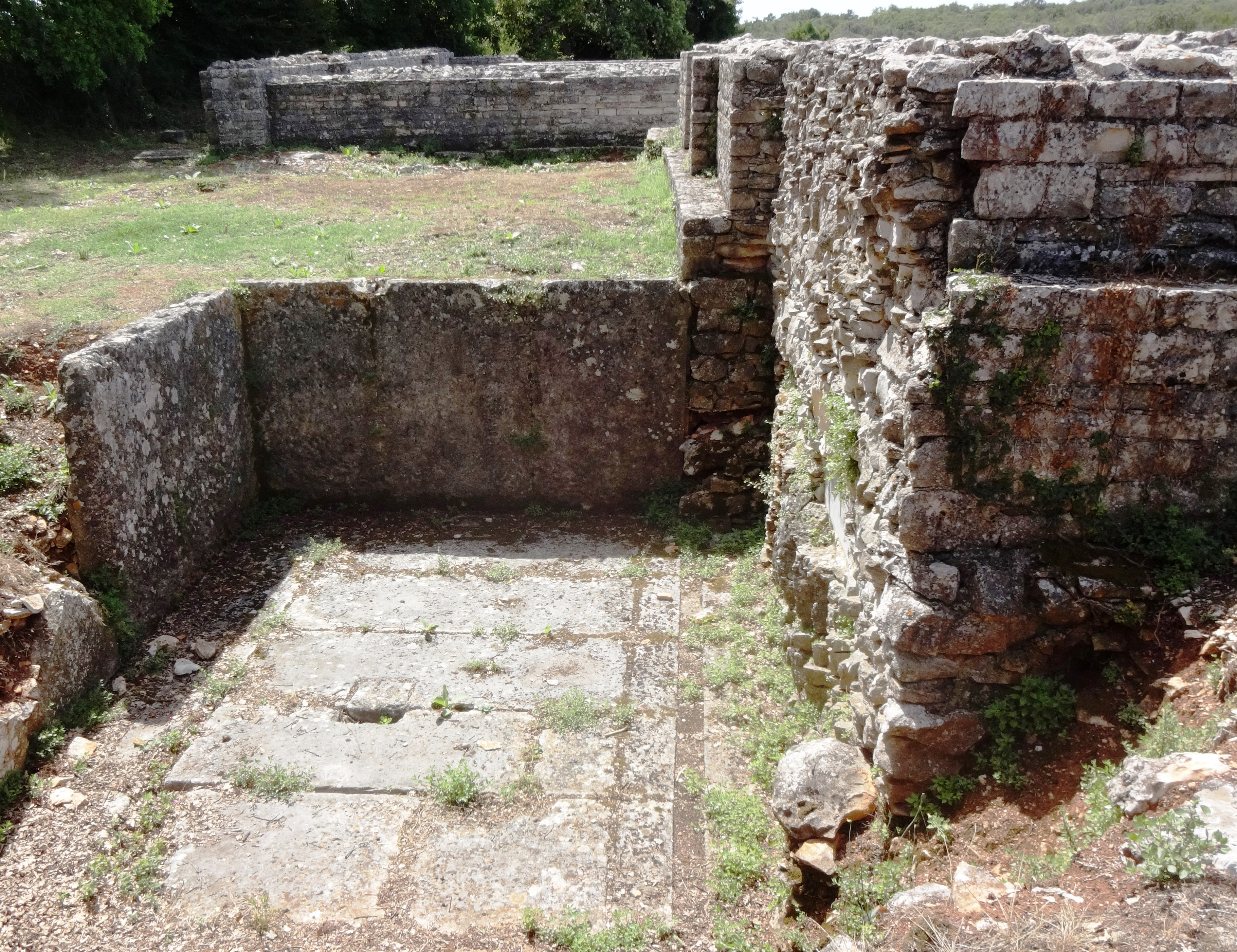 Zisterne in Nesactium